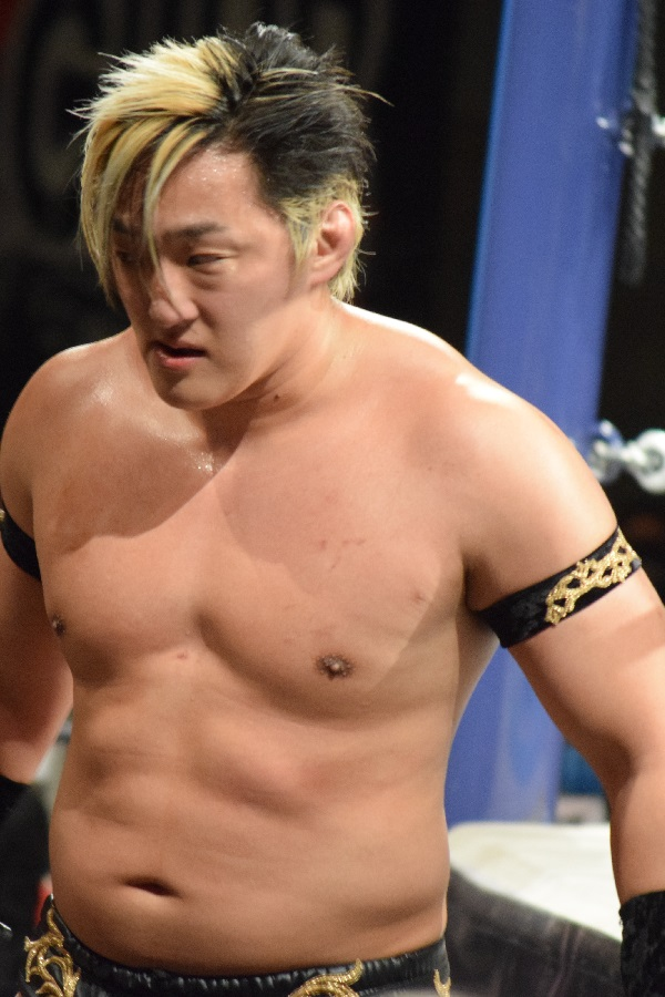 2017年3月12日 ベイコム総合体育館 「NEW JAPAN CUP 2017」 タイチ